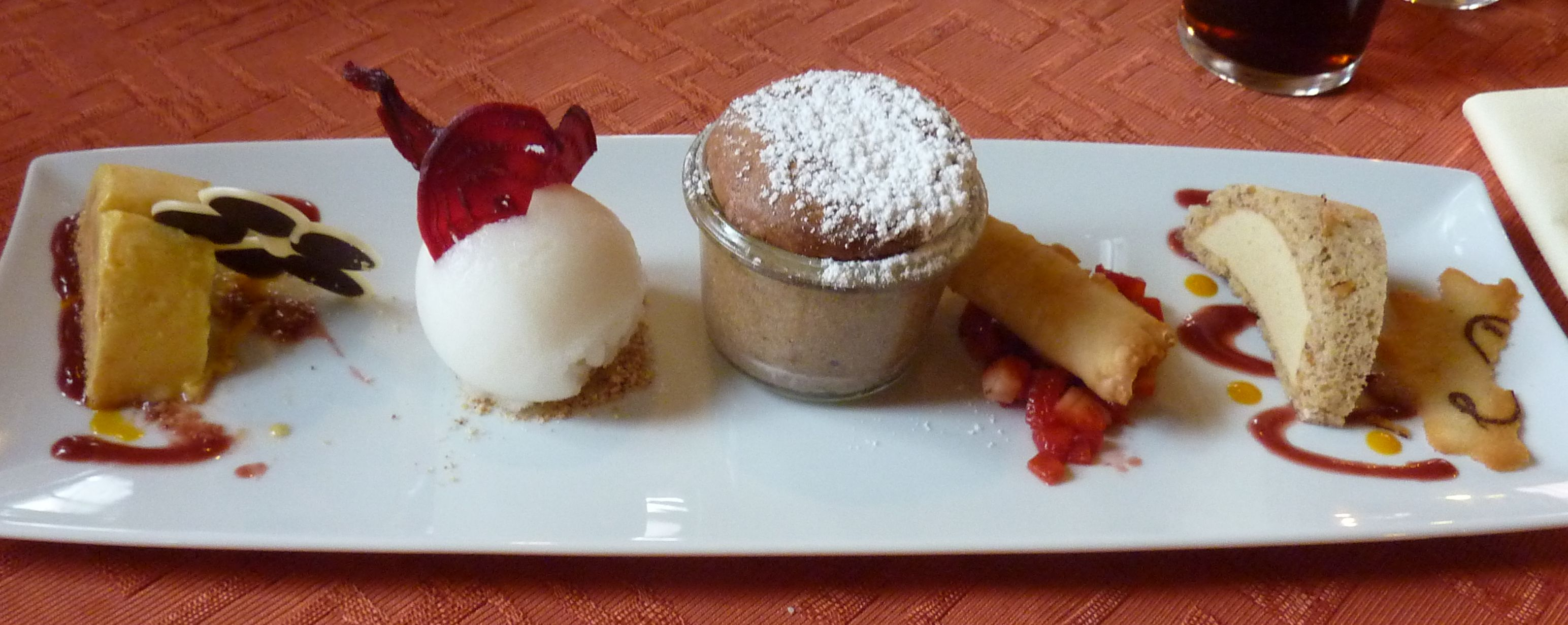 verschiedene Desserts